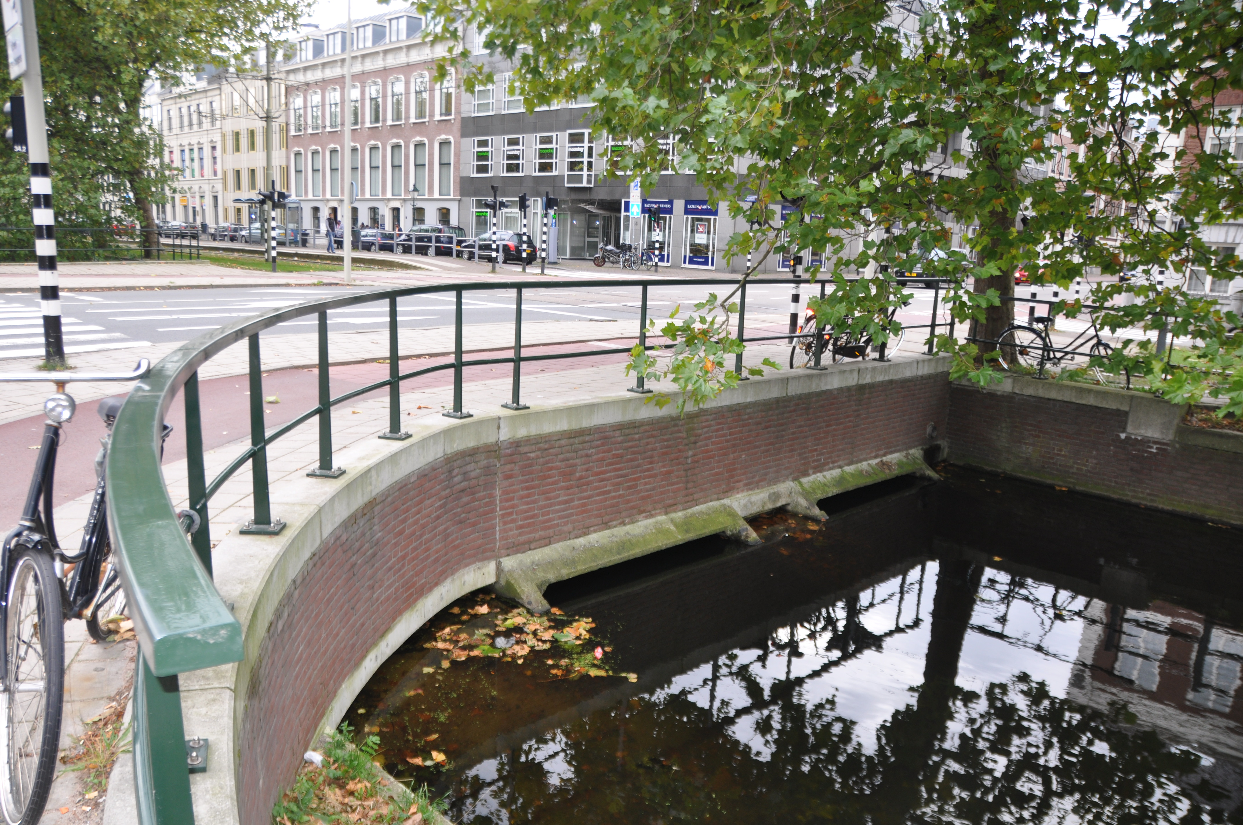 Bruggen in Den Haag.